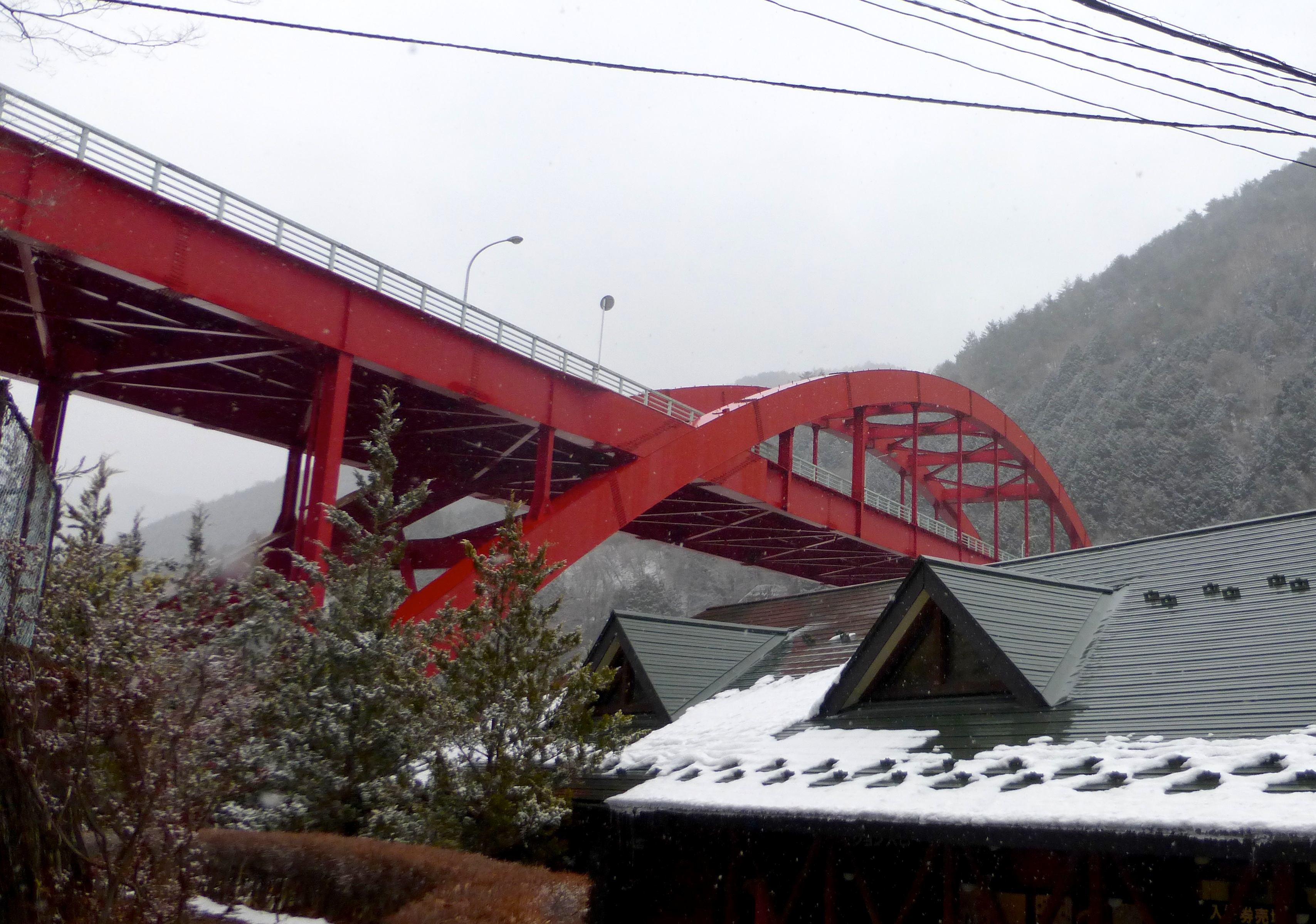 高津戸橋（たかつどばし, Takatsudo bridge）は、渡良瀬川の高津戸峡に架かる橋である。(群馬県みどり市大間々地区と高津戸地区)